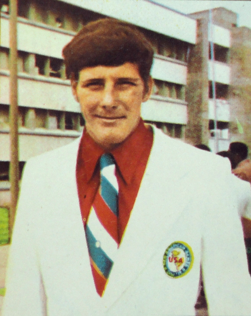 MUNCHEN 72-Figurina-Stickers-Panini-N° 28-BOBICK recuperata